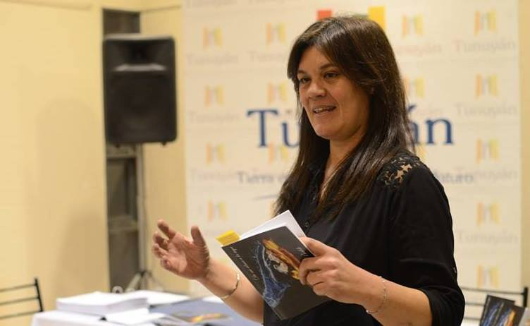 Escritora argentina, de 1971.